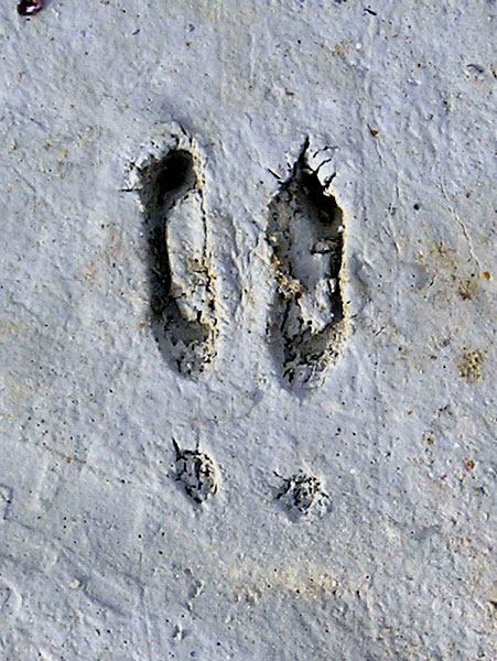 empreinte de Bouquetin prise sur le Secteur du plan Séry, sur la commune de Champagny en vanoise, dans du sable dur, bien lisse